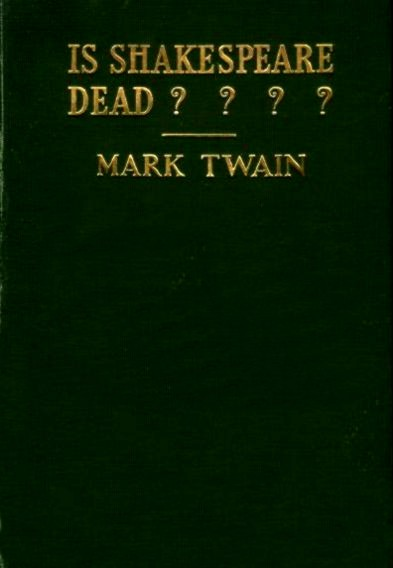 Vorderseite des letzten Buches von Mark Twain, 1909 (Erste Ausgabe).